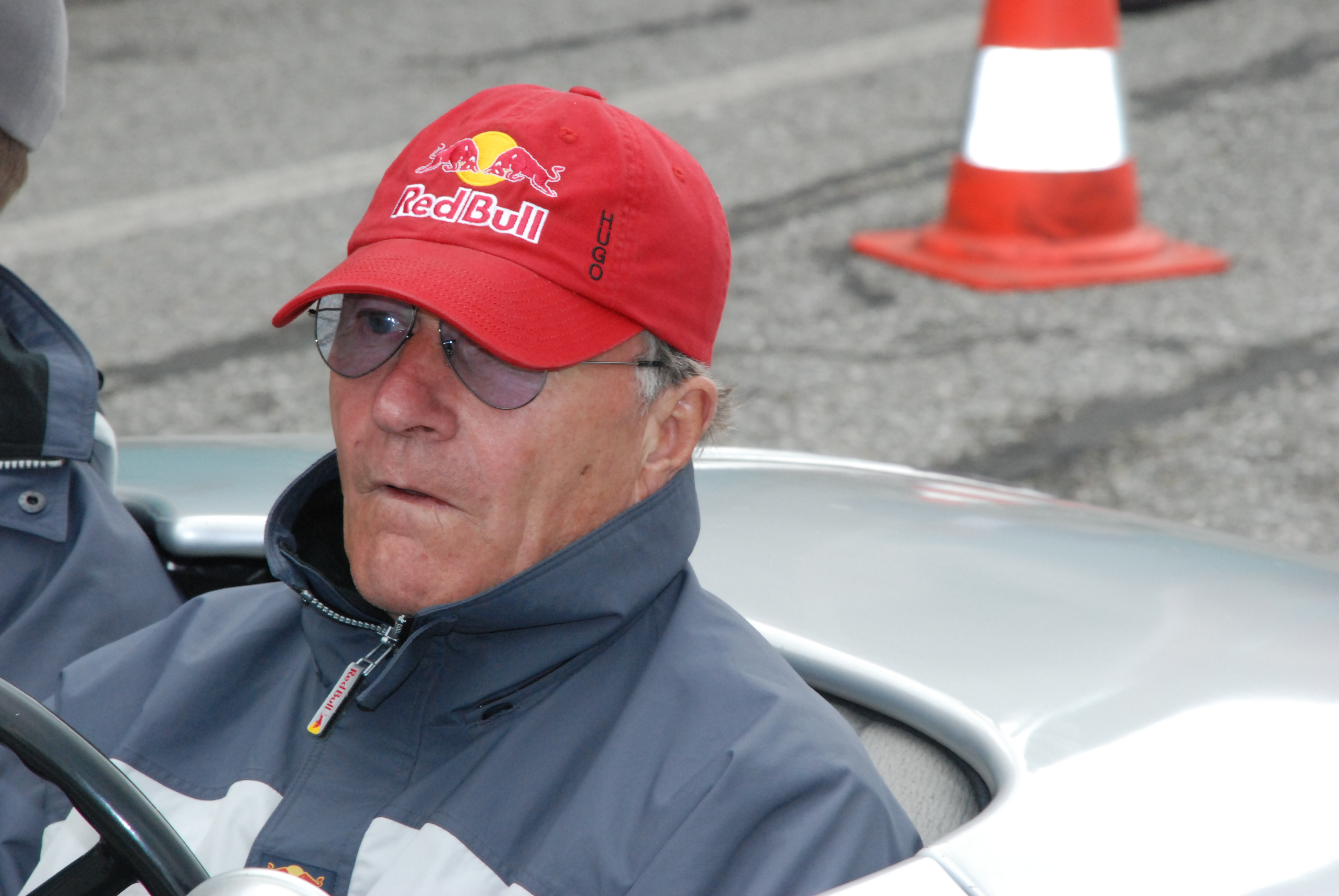 Dieter Quester bei der Ennstal-Classic 2008